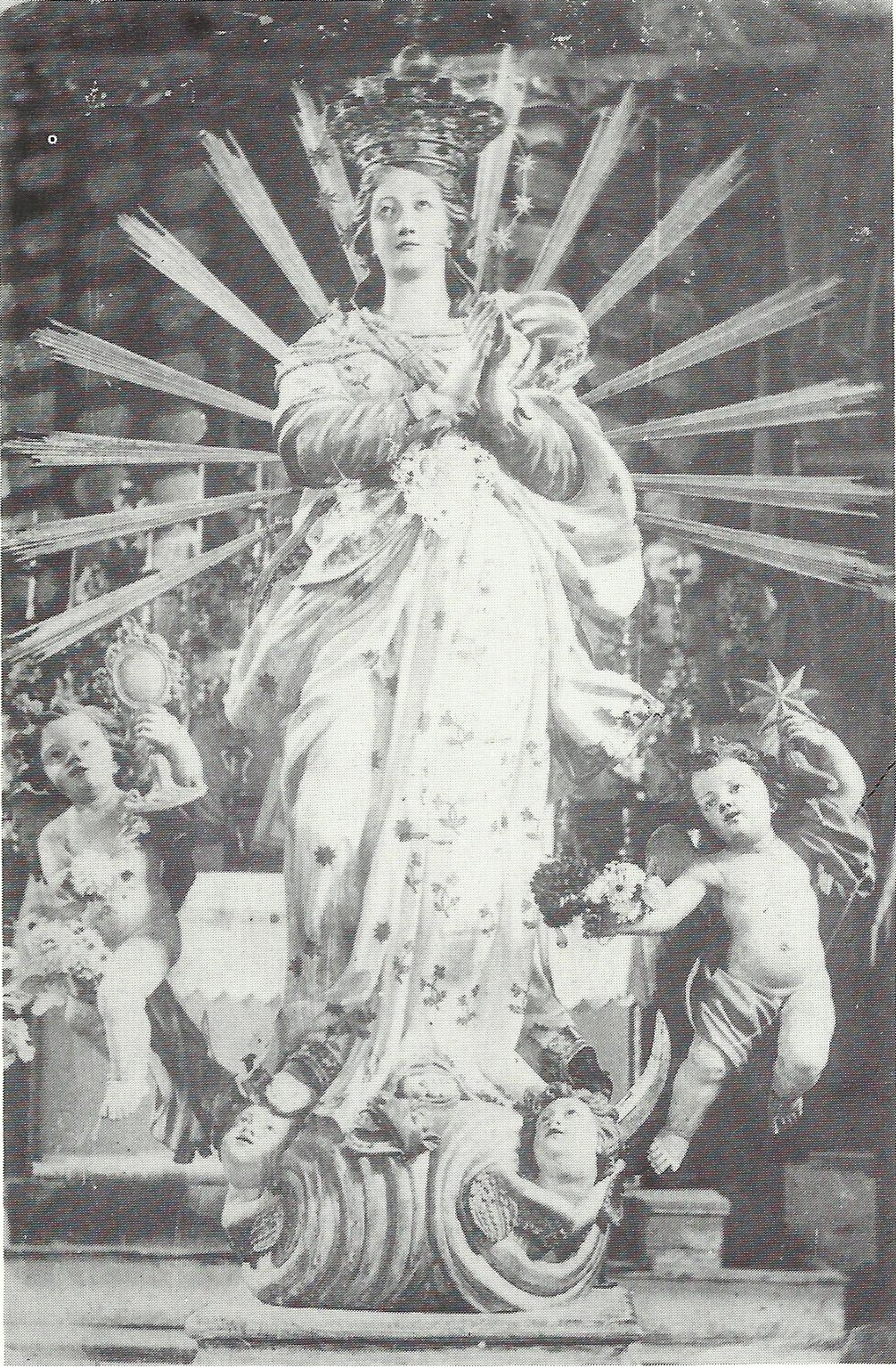 Antica statua di Maria Santissima Immacolata venerata a Palmi fino al 1924. La statua, realizzata sul finire del XVIII secolo dall'artista calabrese Domenico De Lorenzo, venne distrutta il 30 dicembre 1924 da un incendio che colpì la chiesa dell'Immacolata, nella quale era collocata.